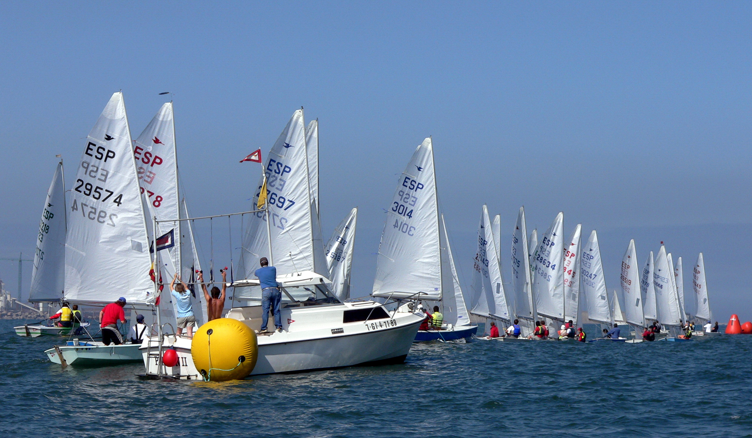 Salida de una manga, Memorial Carlos del Castillo 2007